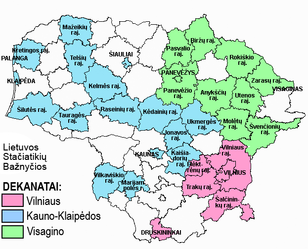 Lietuvos Stačiatikių Bažnyčios dekanatų žemėlapis